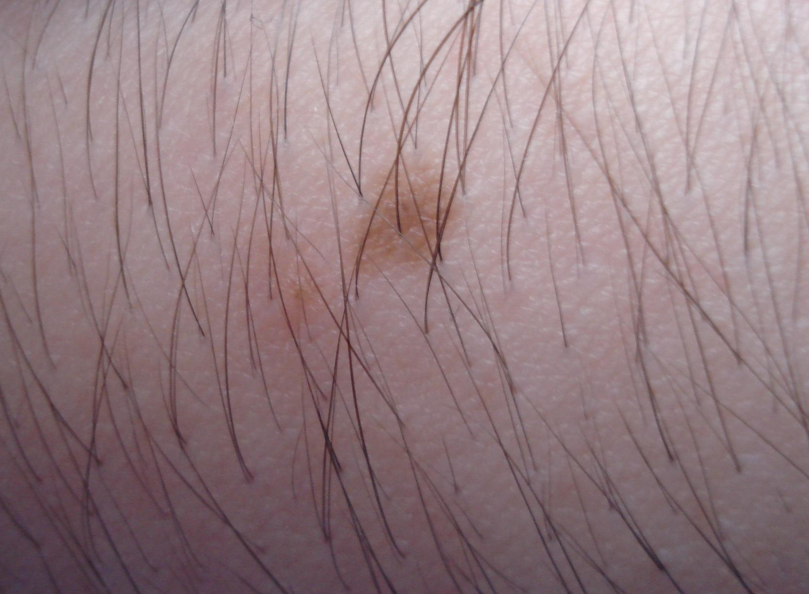 Photo d'un grain de beauté (naevus - nævus) situé sur l'avant-bras.